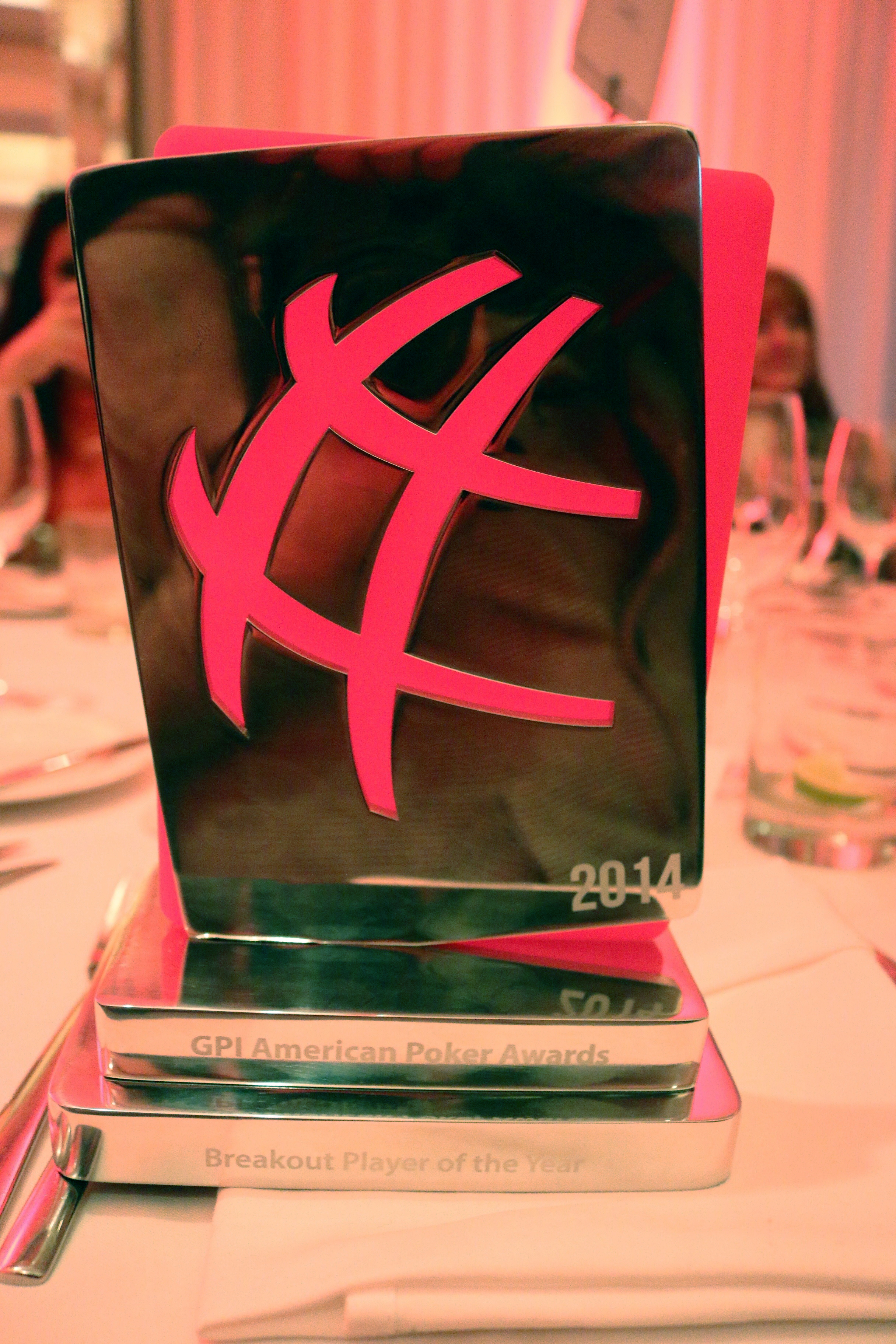 Ein American Poker Award bei der Auszeichnung 2014